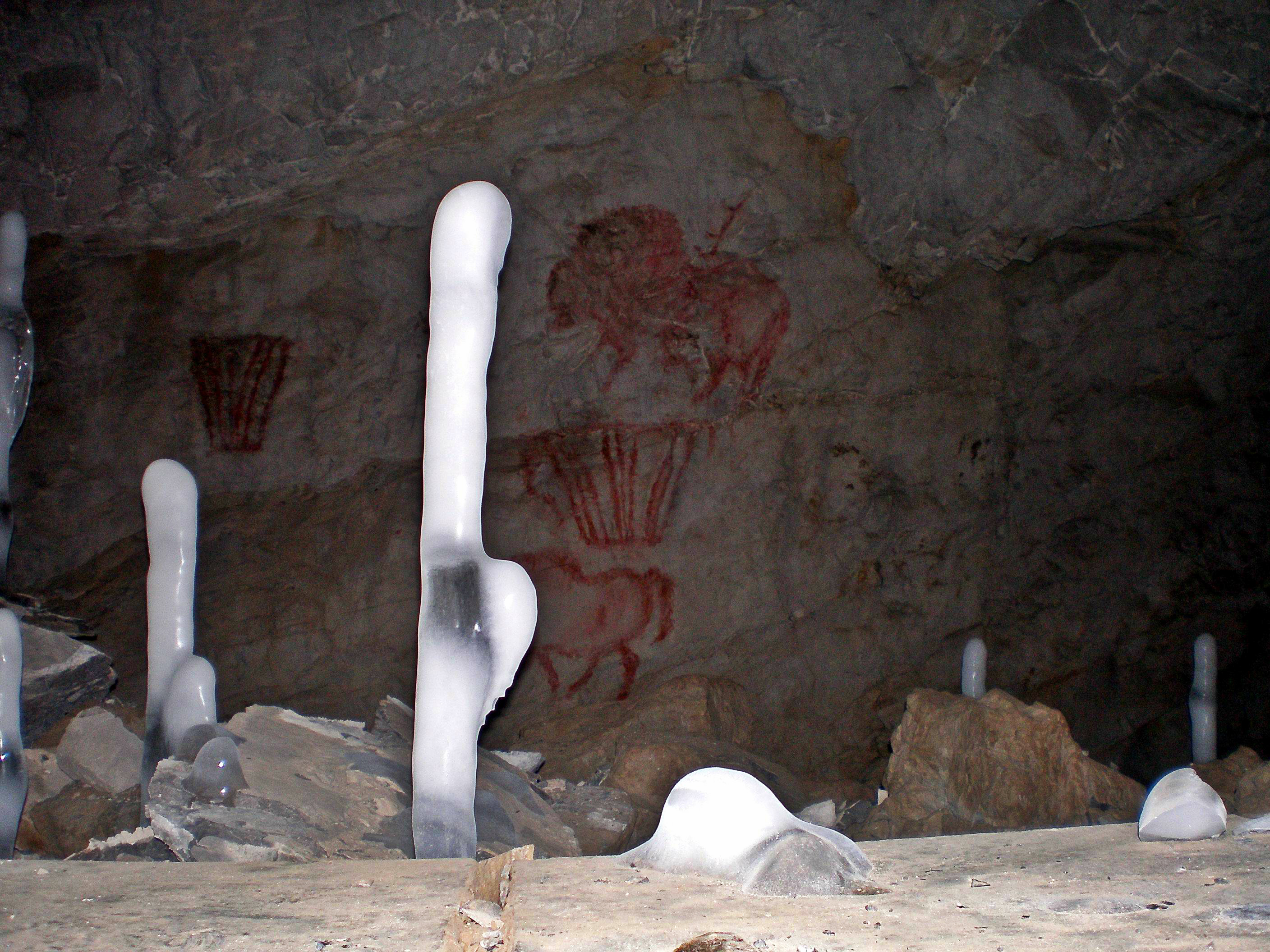 Капова пещера (Шульган-Таш), Бурзянский район This image is related to the protected area of Russia number 0220101